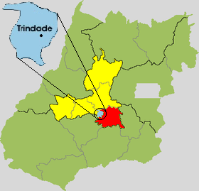 Retirado da propria Wikipédia